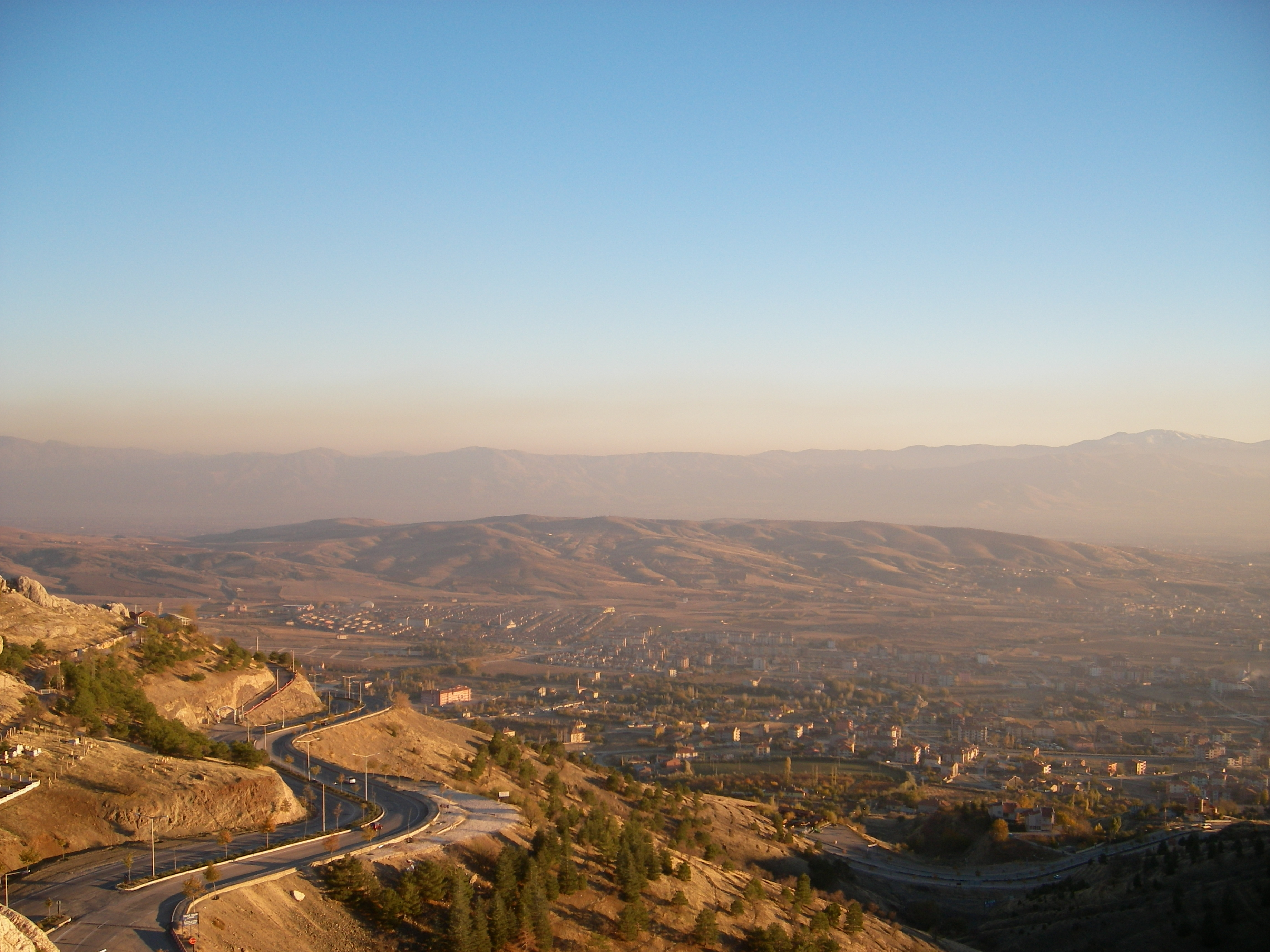 Elazığ'da genel görünüm